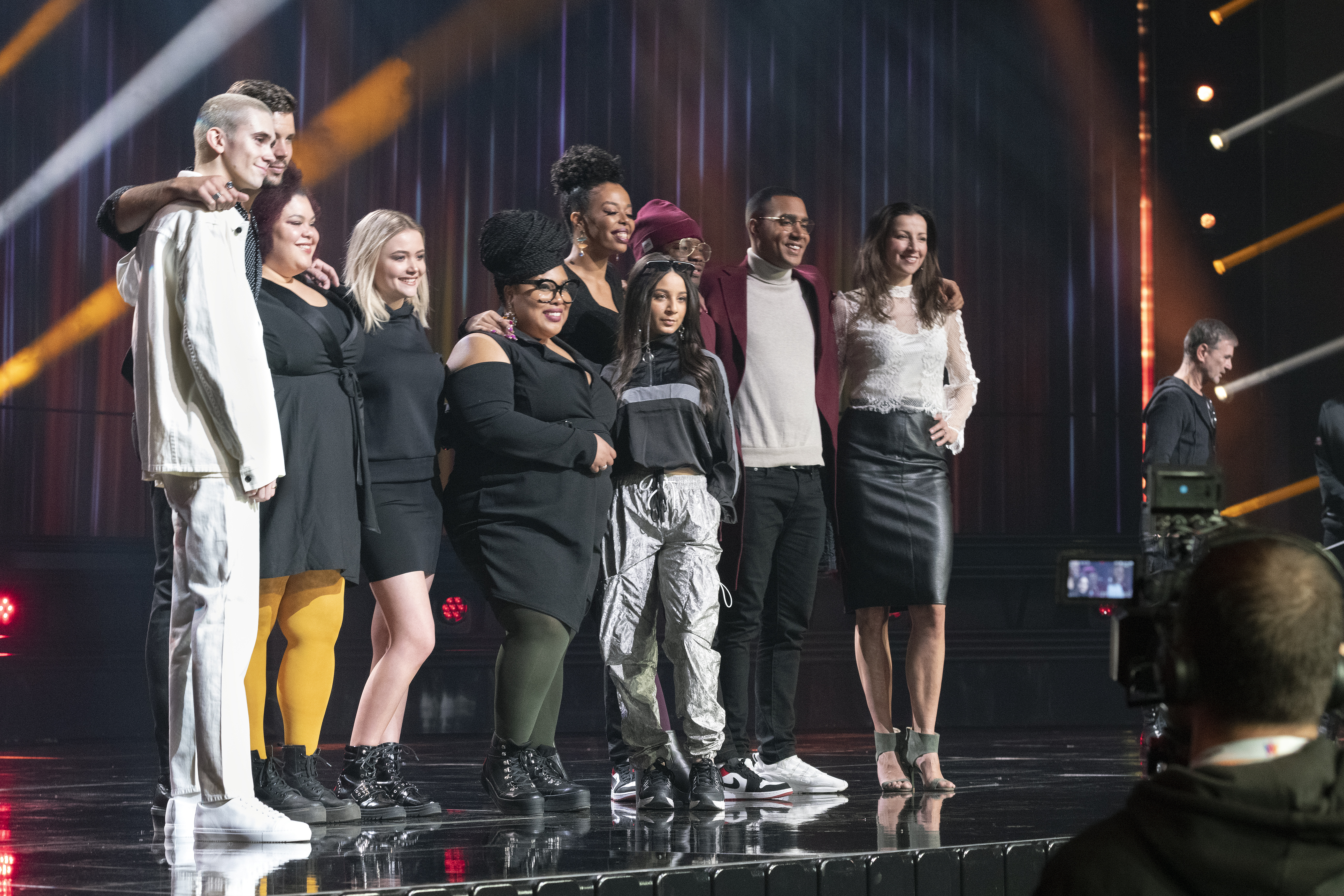 Startfältet Melodfestivalen 2020 Linköping presskonferens